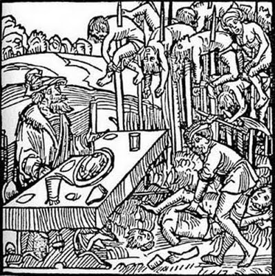 Woodcut from the title page of a 1499 pamphlet published by Markus Ayrer in Nuremberg. It depicts Vlad III "the Impaler" (identified as Dracole wyade = Draculea voivode) dining among the impaled corpses of his victims. Original caption: Hie facht sich an ein graussemliche erschrockenliche hystorien von dem wilden wütrich Dracole wayde. Wie er die leut gespist hat, und gepraten, und mit den haubtern in in einem kessel gesoten, und wie er die leut geschunden hat und zerhacken lassen als ein kraut. Item er hat auch den mütern ire kind gepraten und sy haben müssen selber essen. Und vil andere erschrockenliche ding die in dissem Tractat geschriben stend. Und in welchem land er geregiret hat.